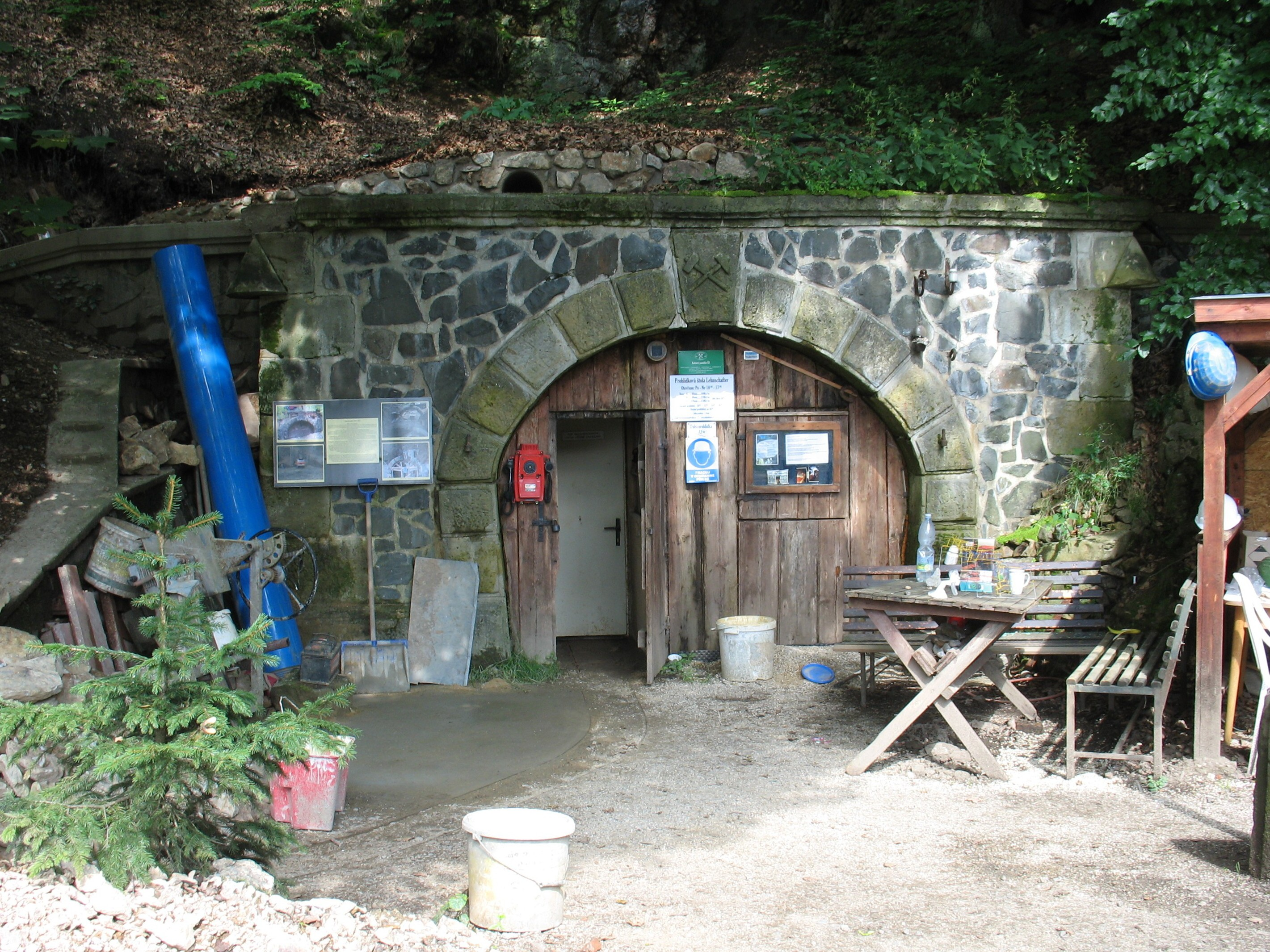 Vstupní portál štoly Lehnschafter